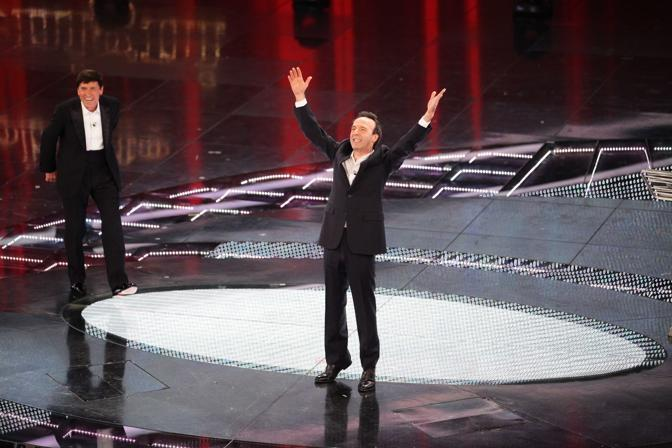 Sanremo 17/02/2011. Teatro Ariston. Terza serata del 61° Festival della Canzone Italiana. Nella foto: Roberto Benigni. Foto di Canio Romaniello per Emme Foto/Olycom - Sanremo.